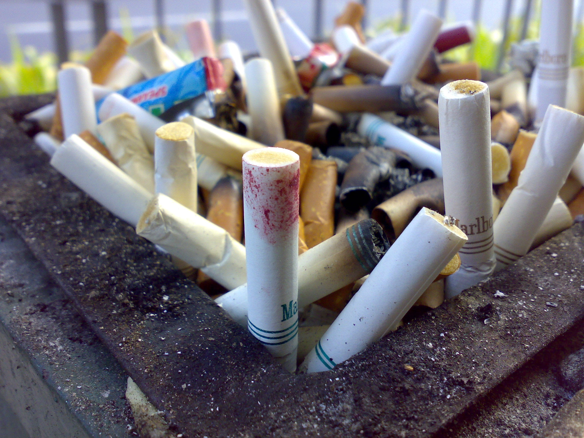 A cigarette disposal tray in Ayala, Makati City